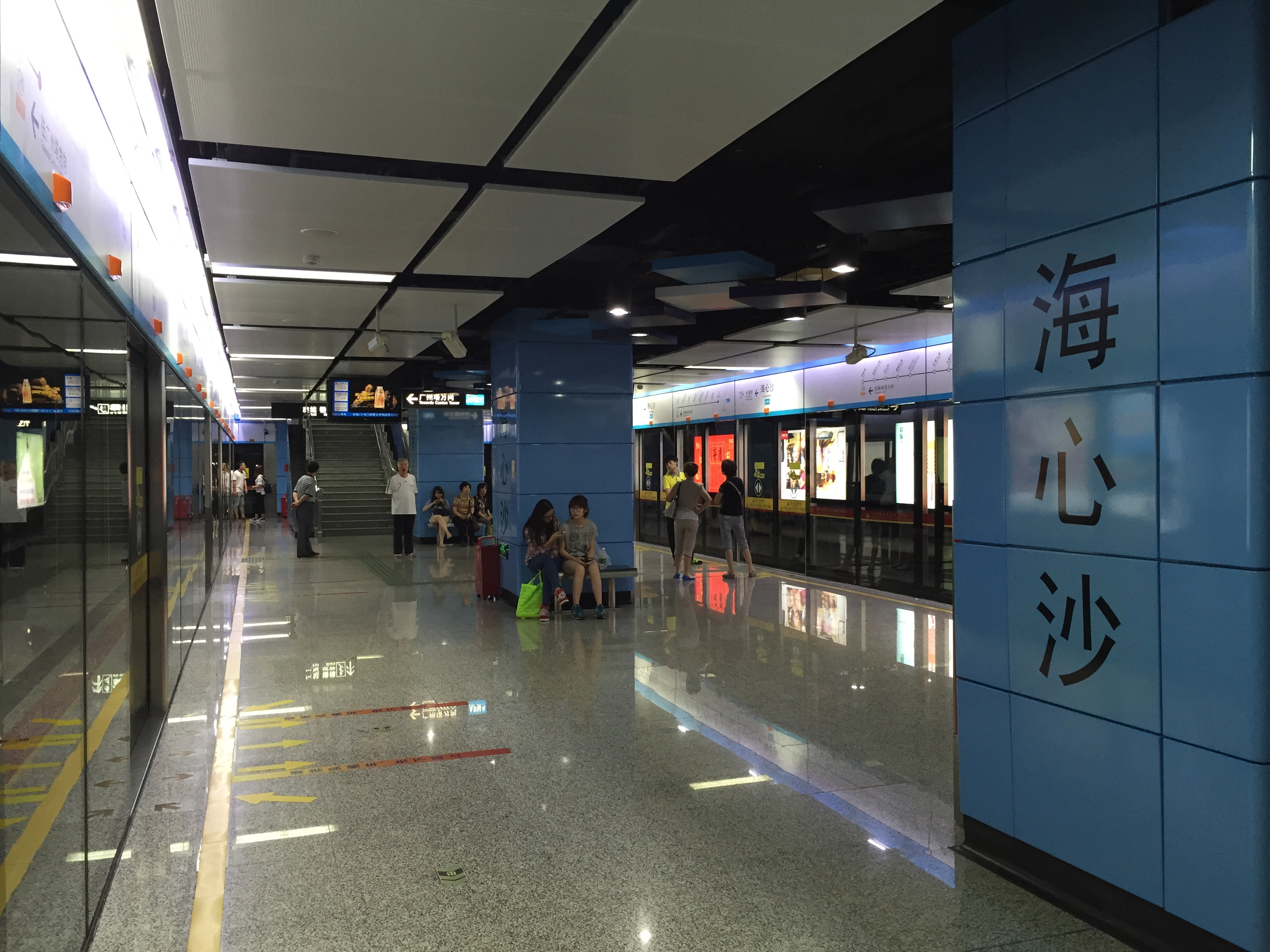 广州地铁海心沙站